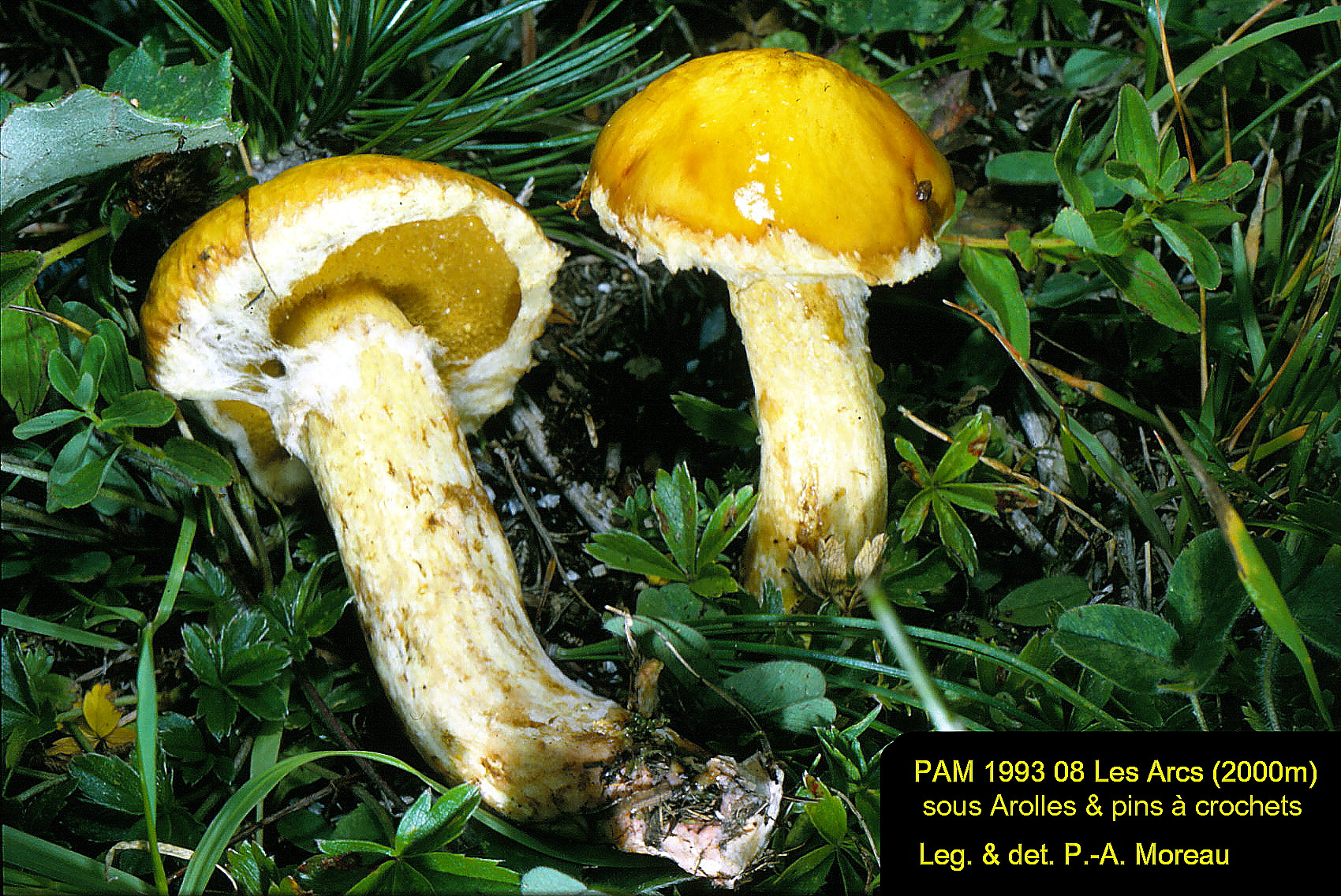 Habitat et altitude typique. Spécimens encore jeunes.